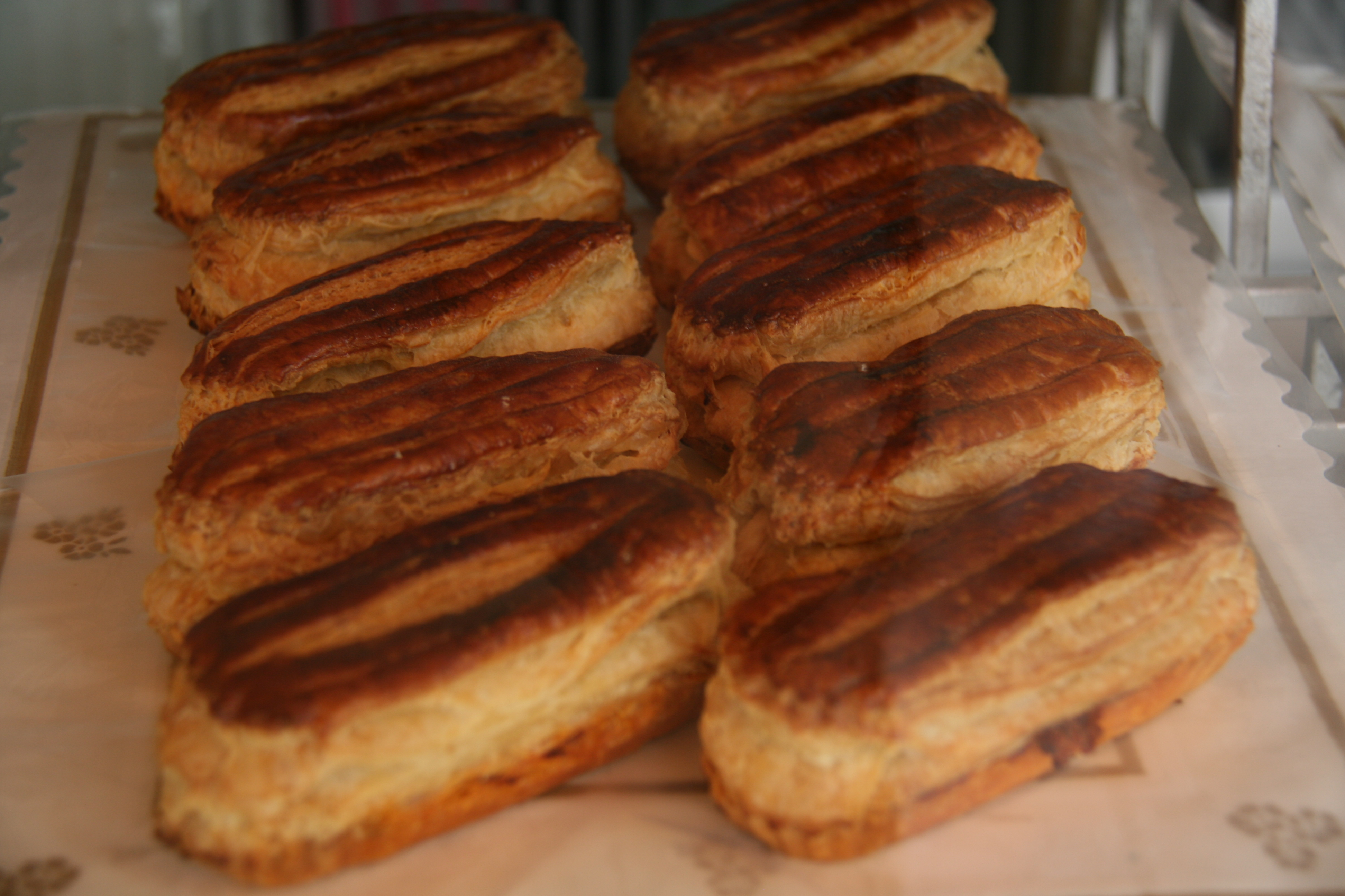 Agujas de ternera en "La Mallorquina" - Madrid